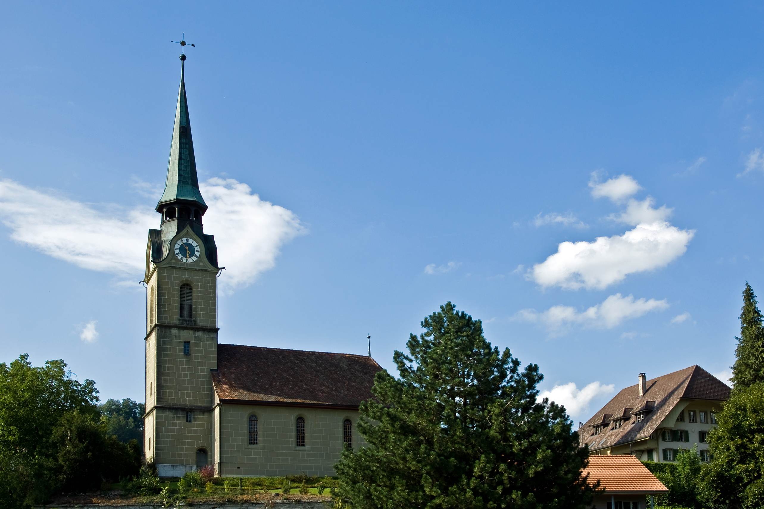 Reformierte Kirche in Heimiswil Kt. Bern, erbaut 1703